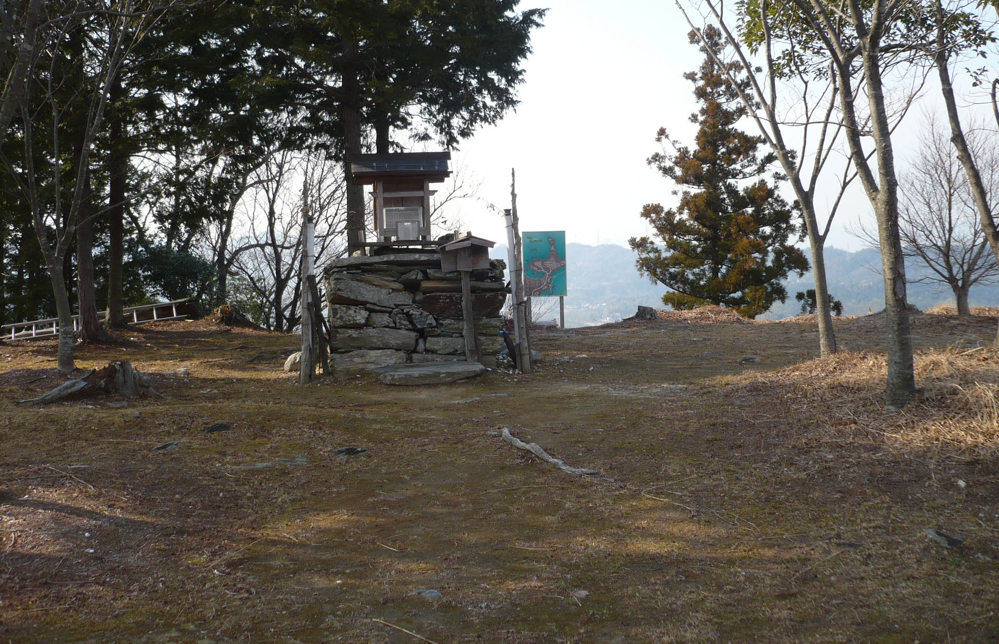 本丸跡